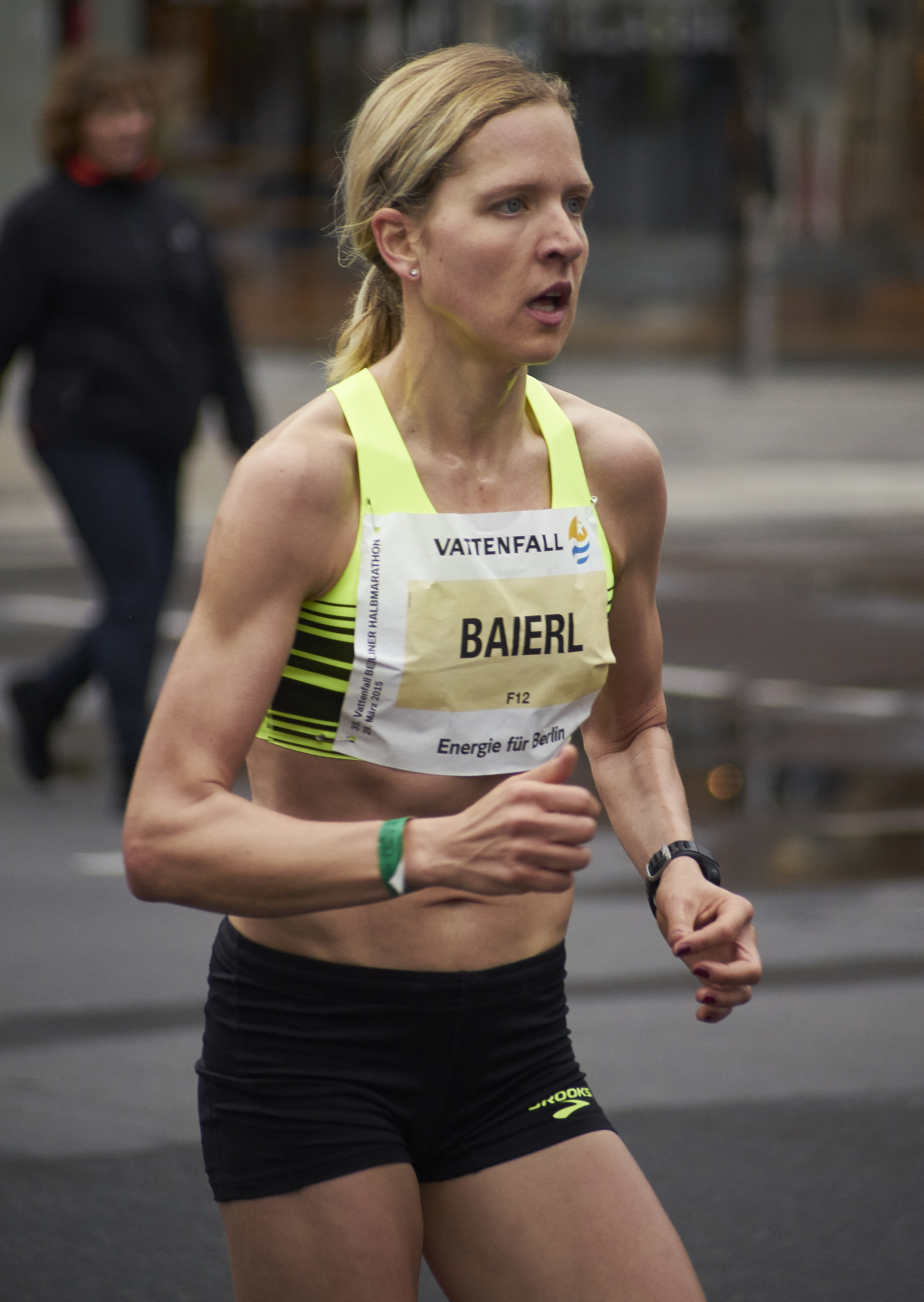 Berliner Halbmarathon 2015, Anita Baierl